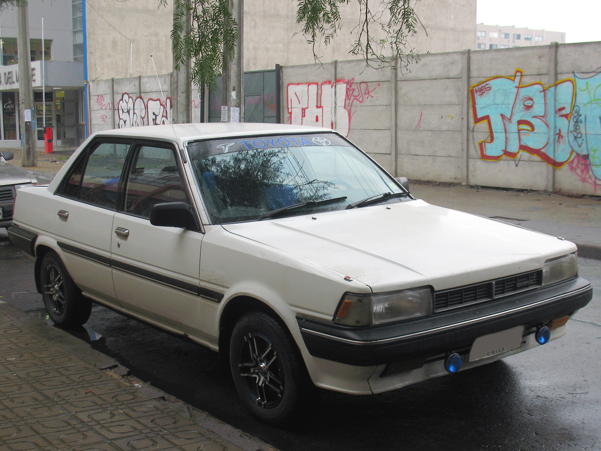 Toyota Carina 1.5 SG 1987